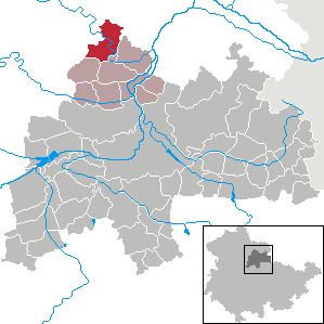 Bilzingsleben in Thuringia - District Sömmerda